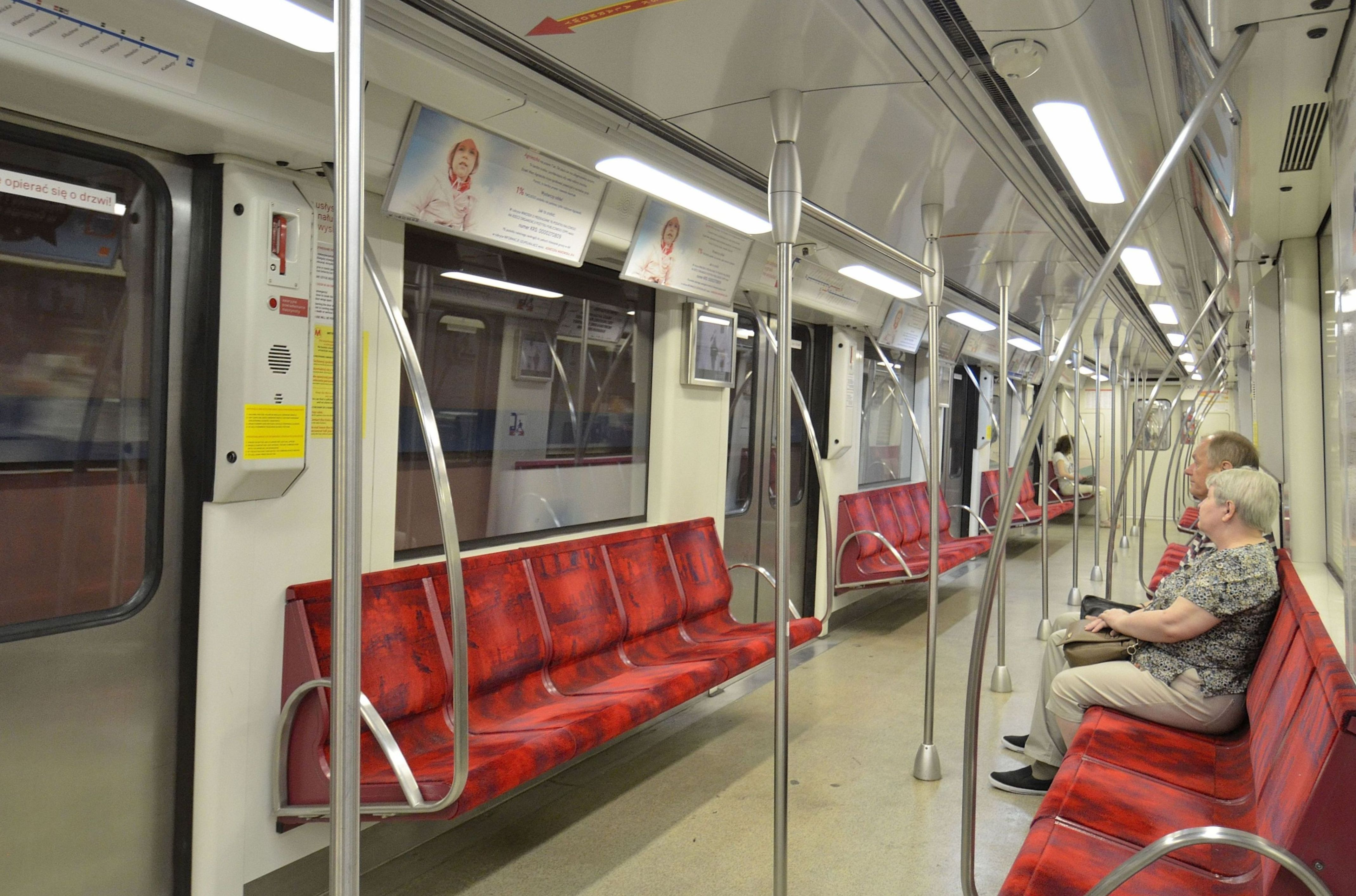 Wnętrze pociągu Alstom Metropolis 98B po wymianie tapicerki